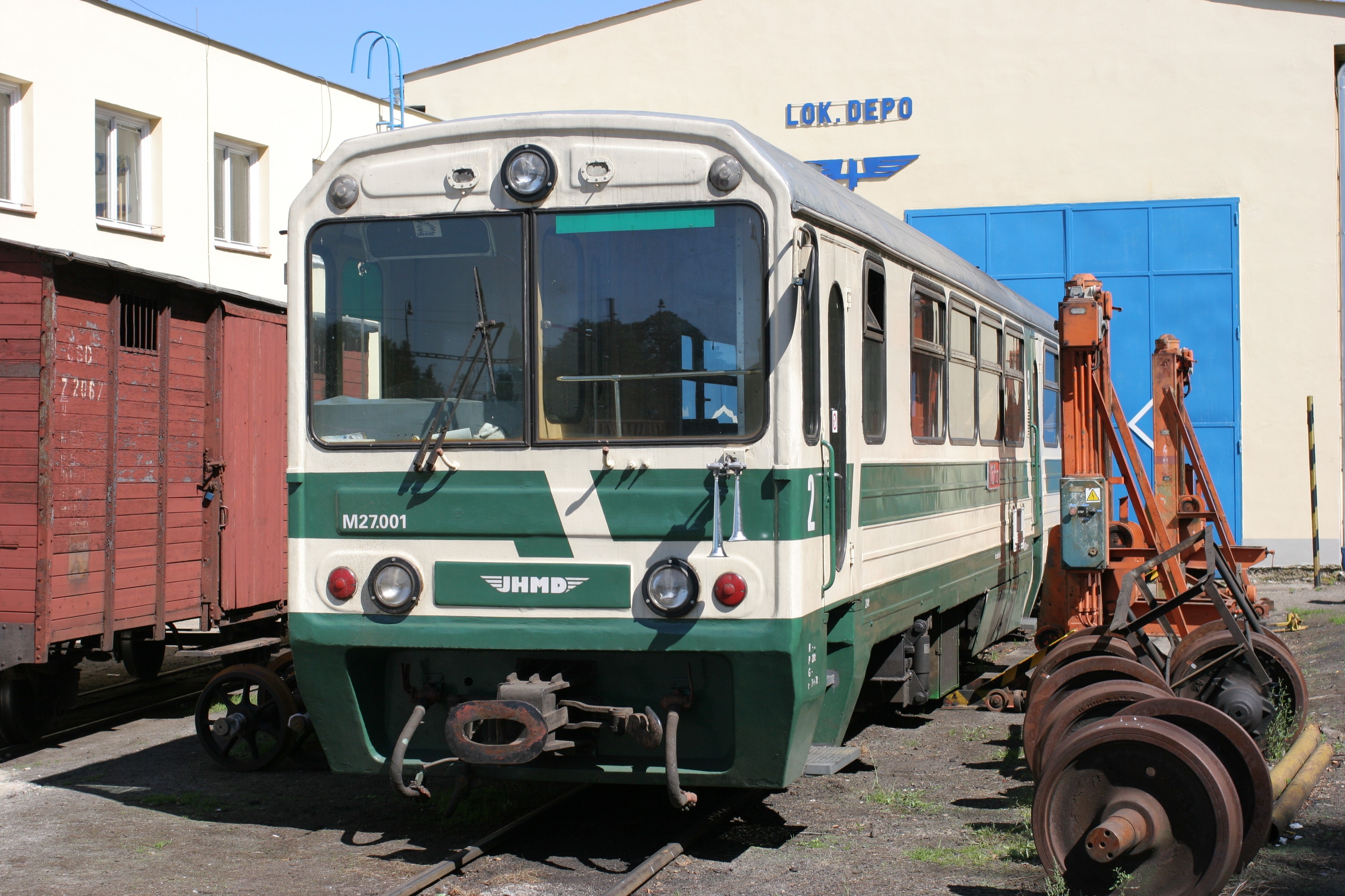 fsu